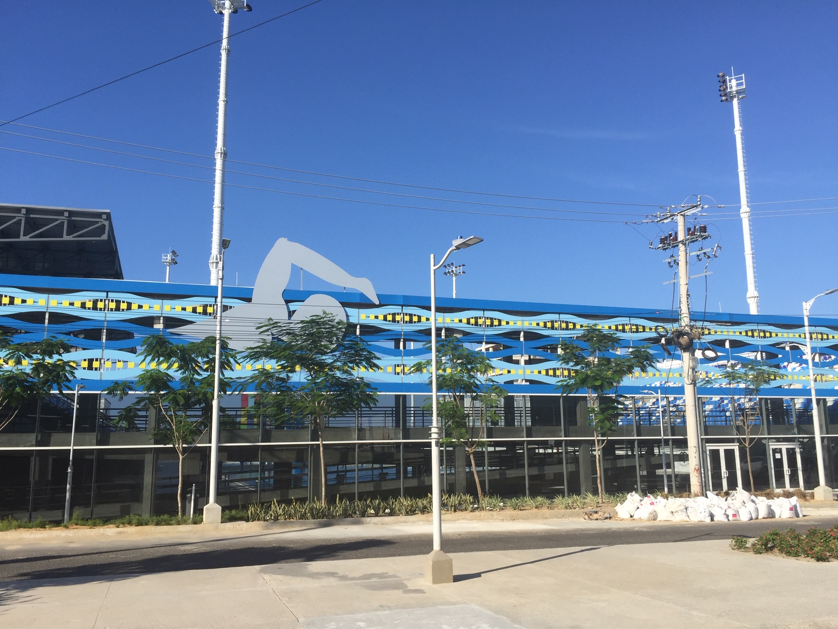 Piscina Olímpica de Barranquilla